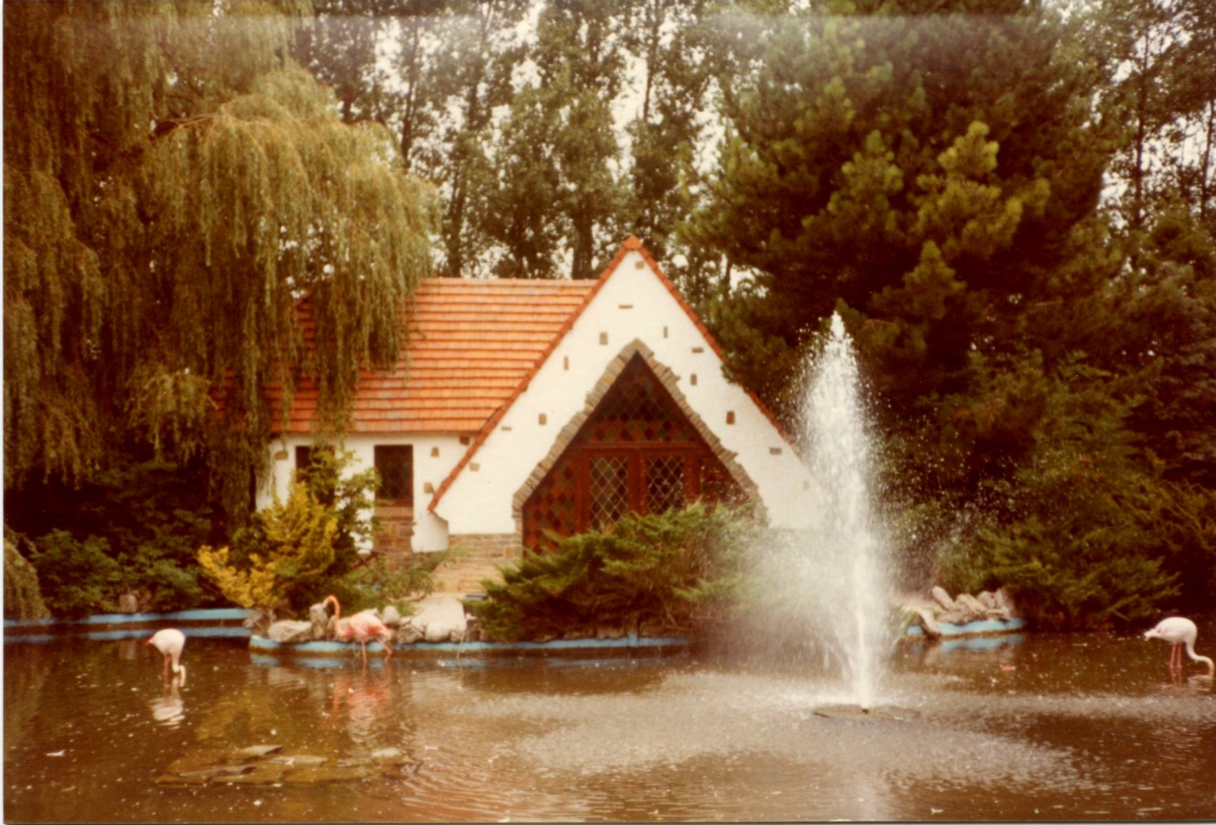 MeliparkBassinFlamantRose